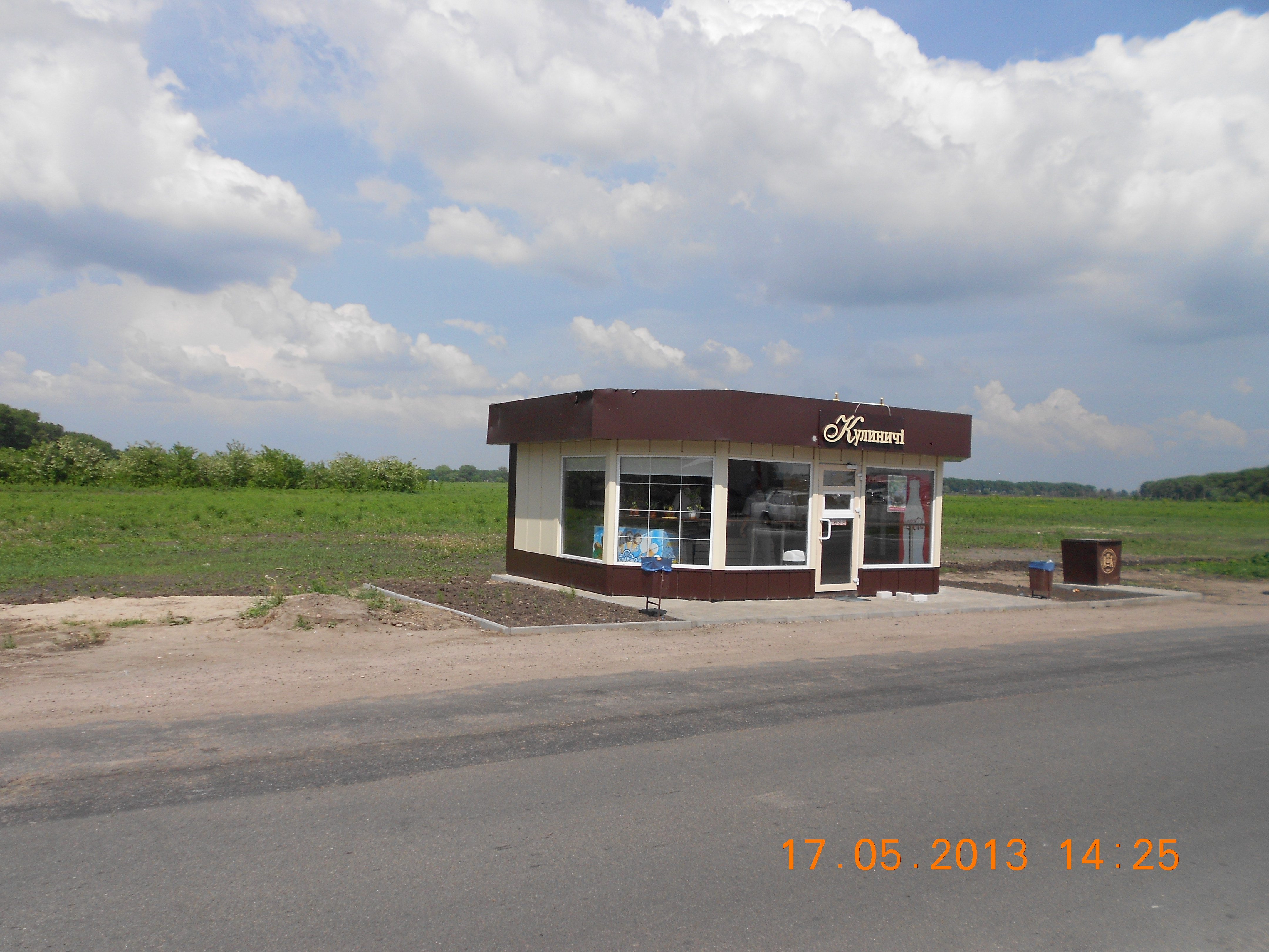 Krushynka17-05-2013MagazynKulynychi